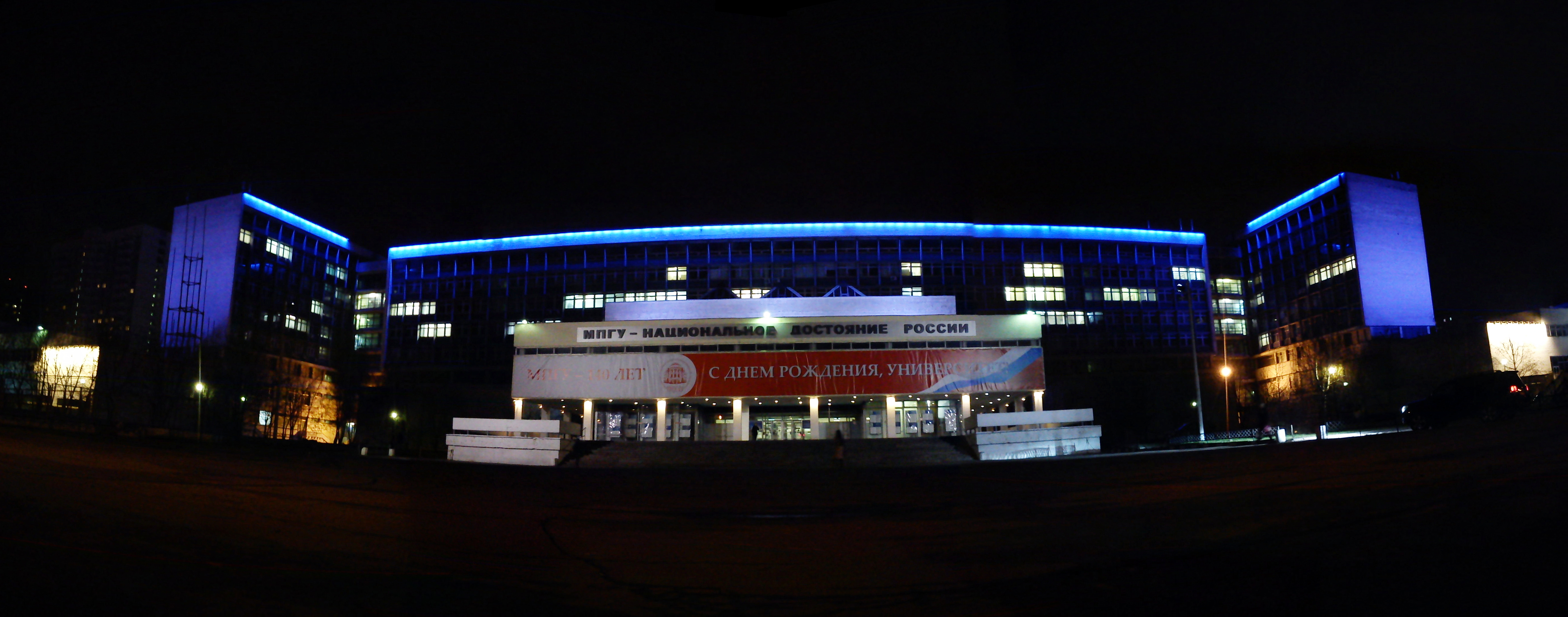 Корпус гуманитарных факультетов МПГУ ночью